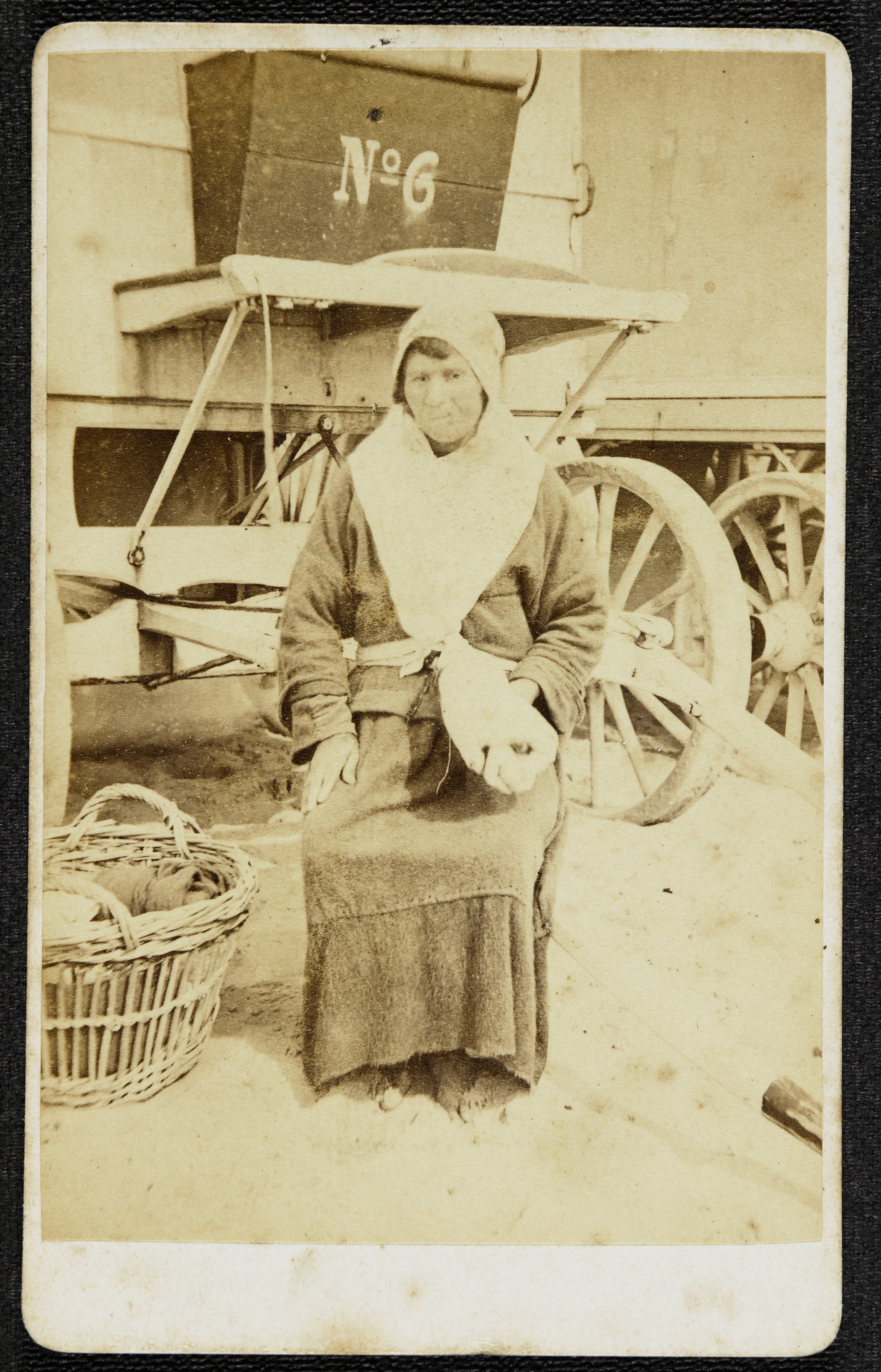 Souvenir de Schéveningue, gemaakt door fotograaf Jacobus van Koningsveld